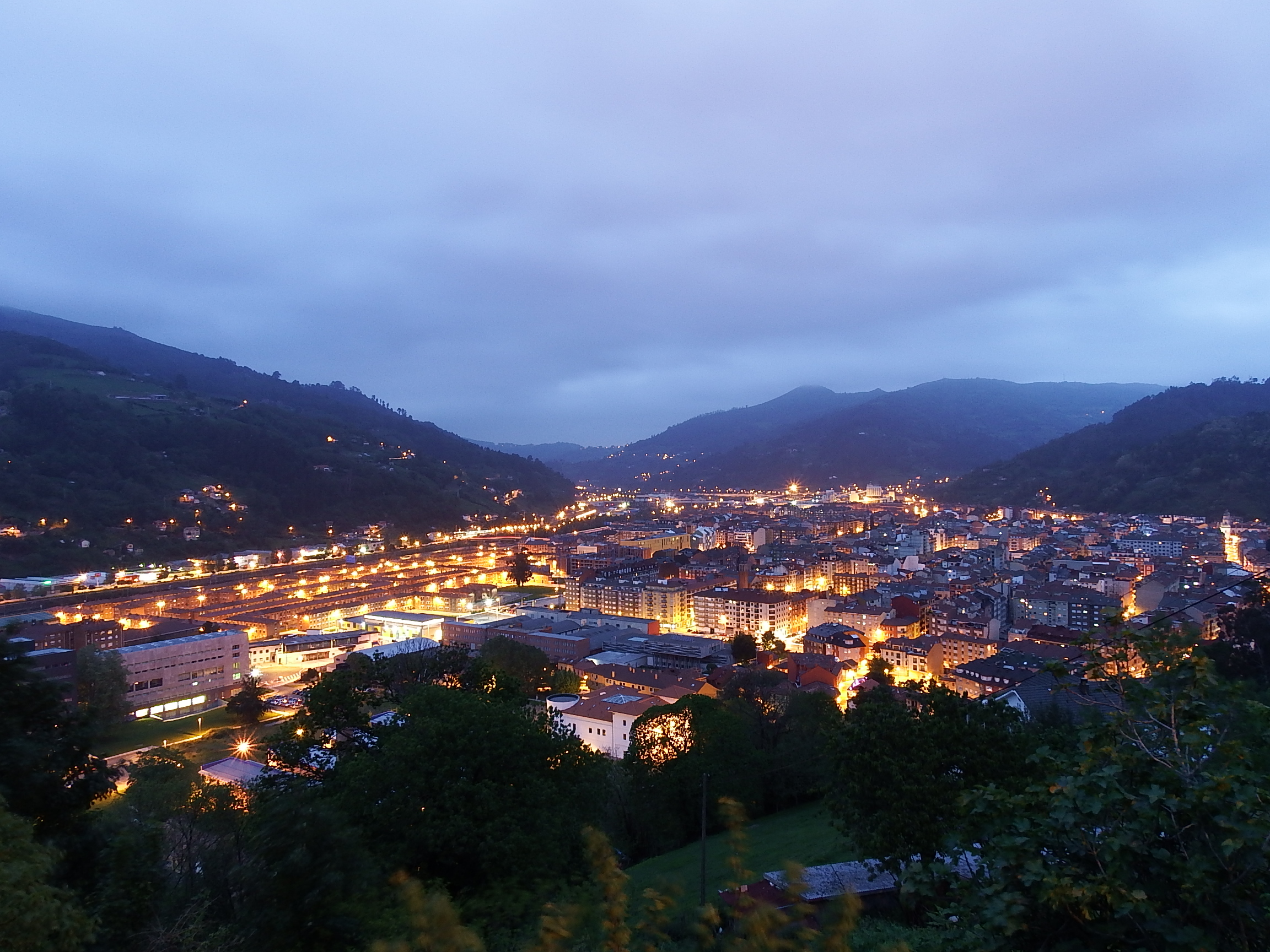 Cuencas Mineras